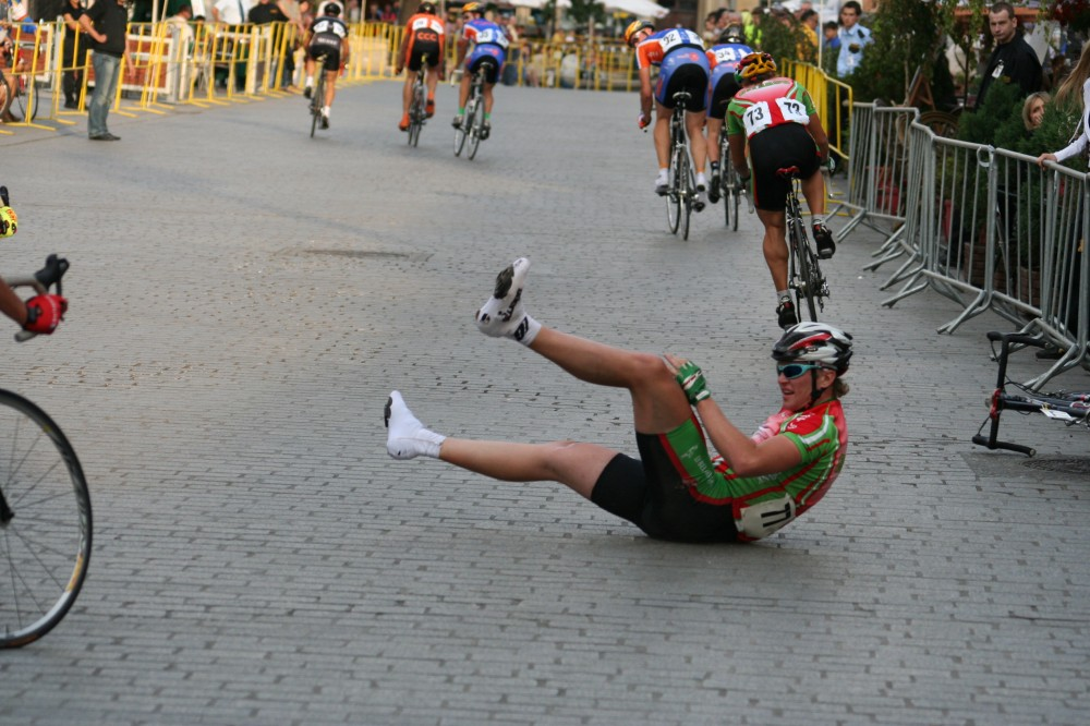 Kraksa na Małopolskim Wyścigu Górskim, 2007r.